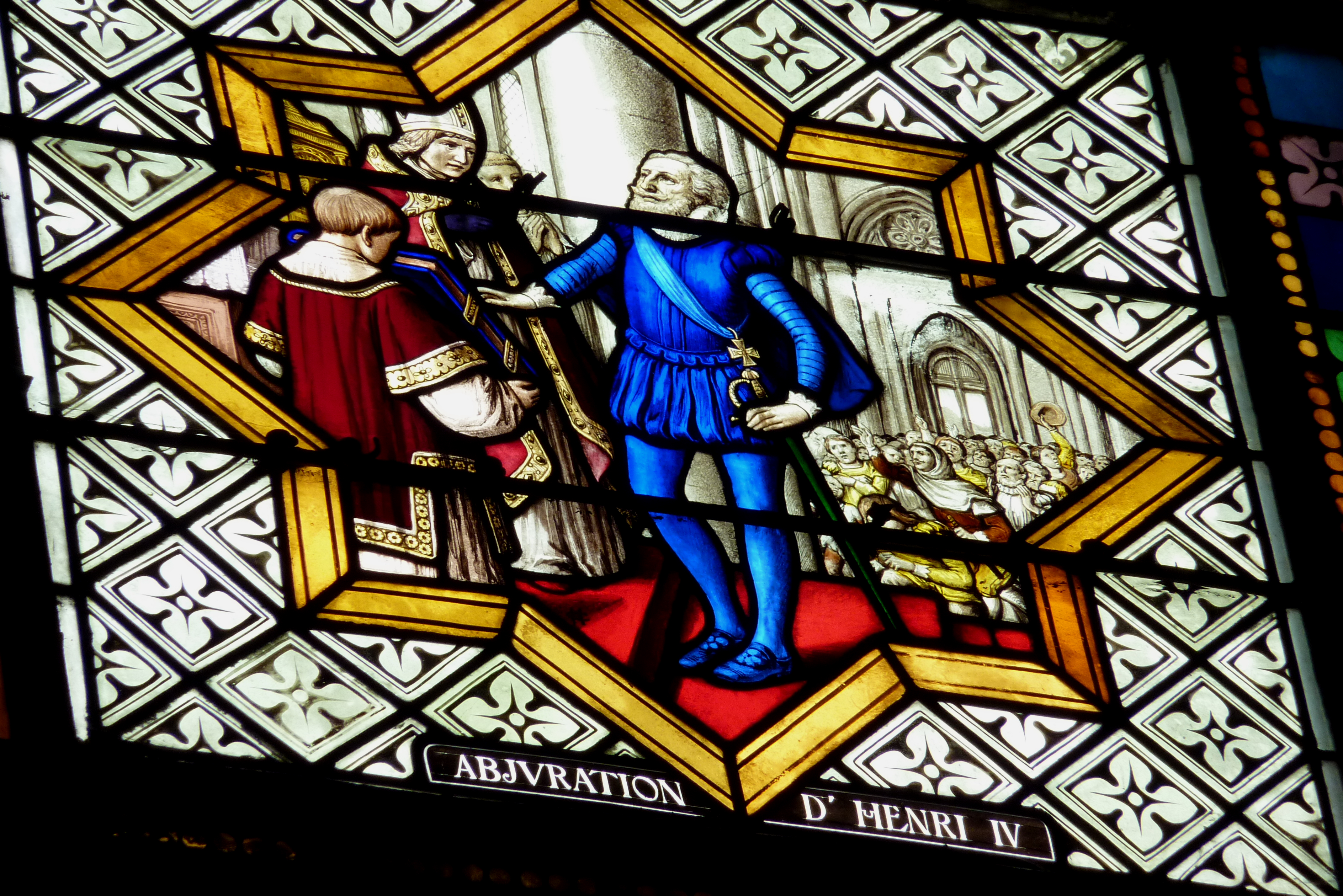 Bleiglasfenster (Ausschnitt) in der katholischen Pfarrkirche Cœur-Immaculé-de-Marie in Suresnes, Darstellung: "Abschwörung" Heinrich IV.